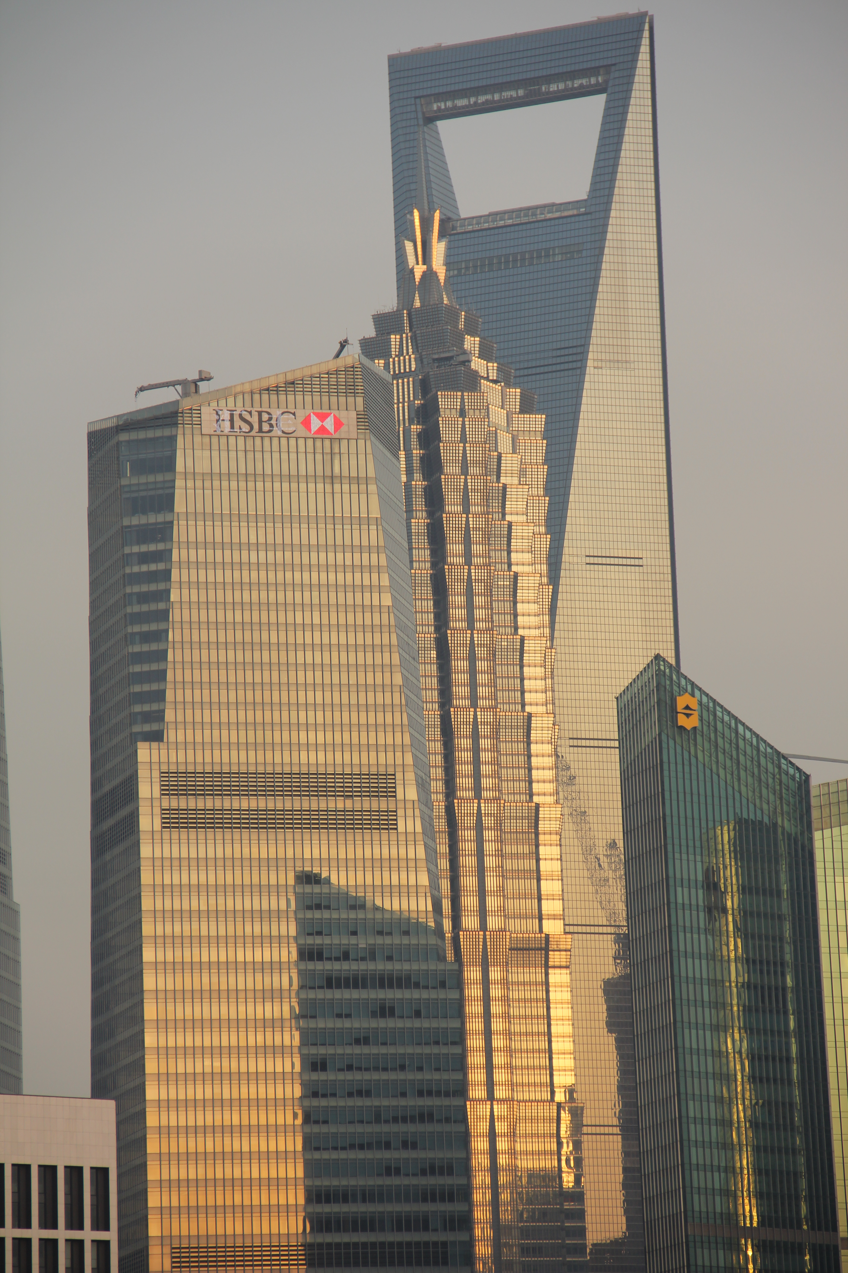 Finanzzentrum Shanghai